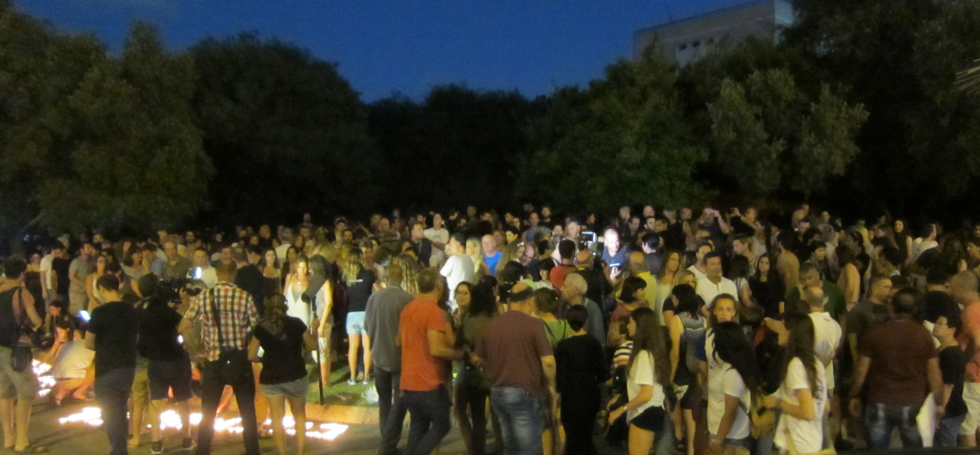 פרשת גל בק - מחאה שקטה בצומת קק"ל חיים לבנון ת"א - מקום התאונה 18.7.15